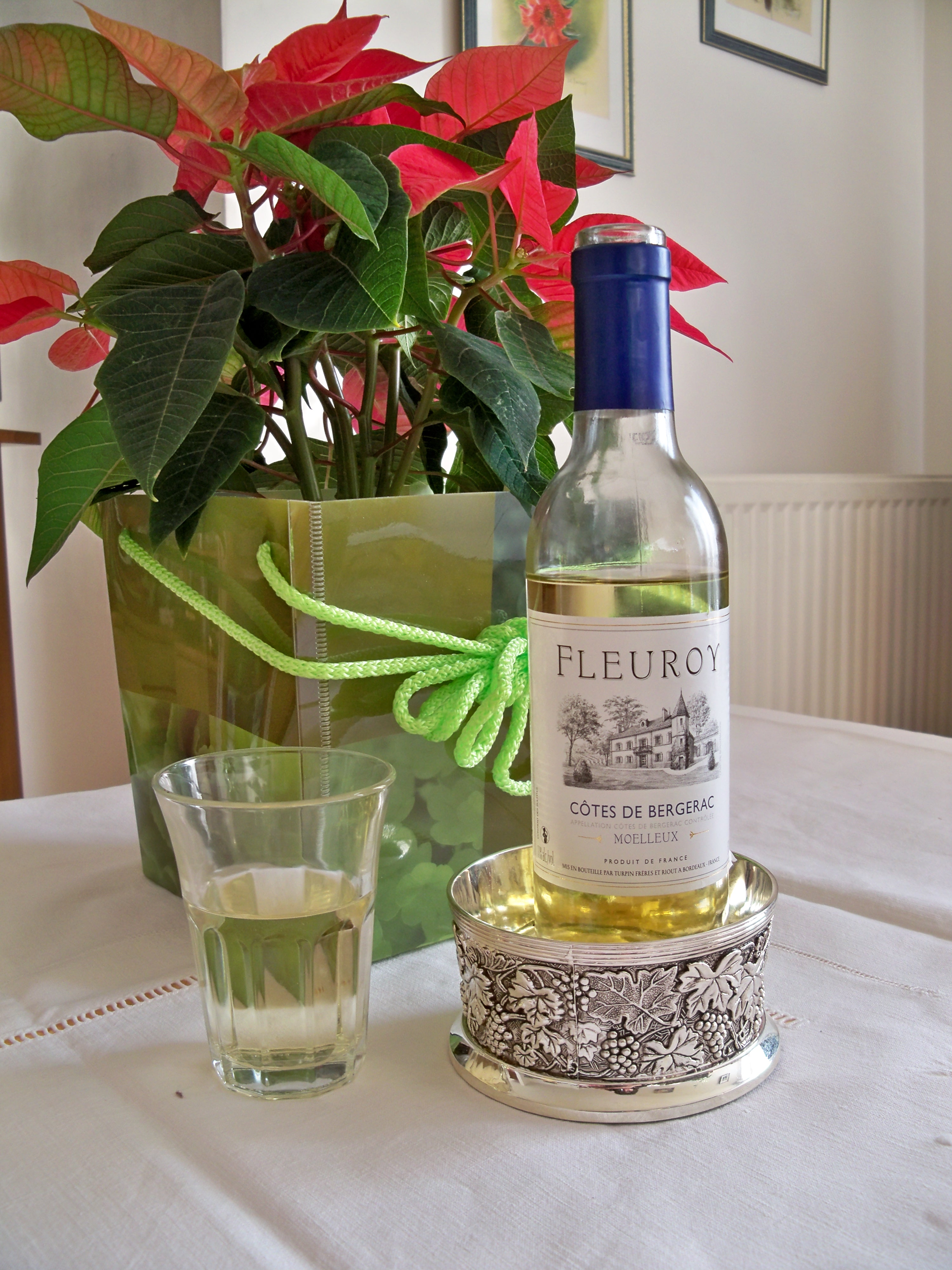 Bouteille de Fleuroy, Côtes de Bergerac